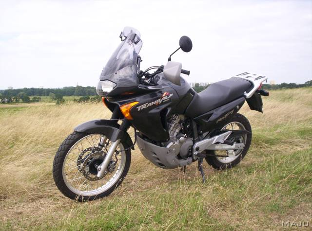 Honda XL650V Transalp 2000